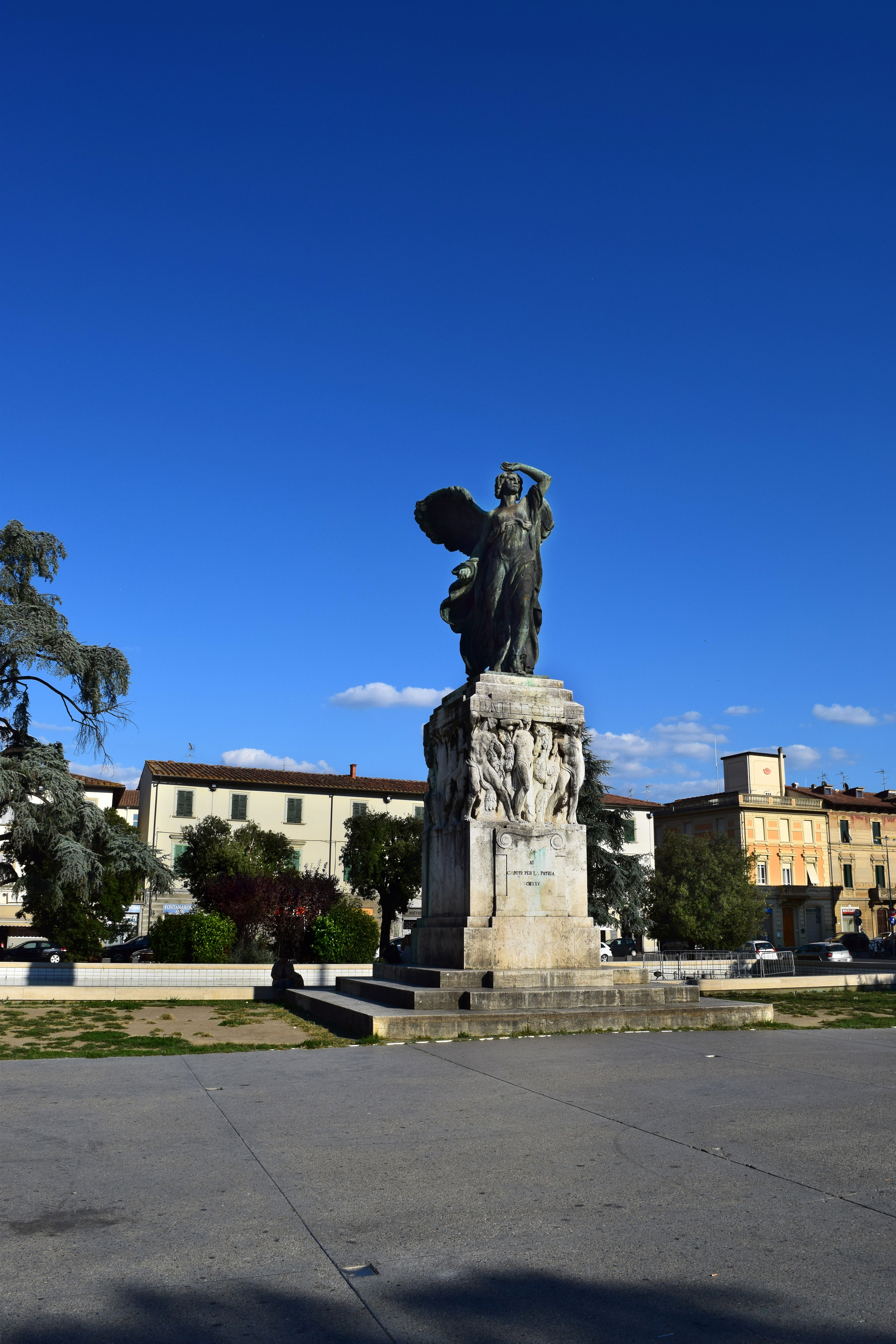 Piazza della Vittoria si apre appena fuori l'antico perimetro delle mura cinquecentesce, dove sorgeva Porta Fiorentina, questo è stato uno dei principali punti di aggregazione sociale e commerciale di Empoli. This is a photo of a monument which is part of cultural heritage of Italy.